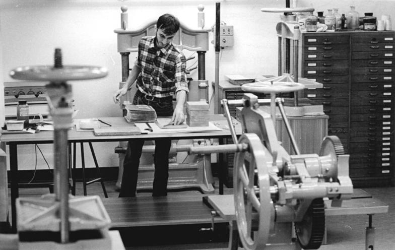 Leipzig, Deutschen Bücherei, Restaurierungswerkstatt Zum Beitrag: Wo eine Bibel gebadet und Zeitungen gespaltet werden - In der Restaurierungswerkstatt der Deutschen Bücherei ADN-ZB Grubitzsch - 22.10.1986 - Buchbinder Henrik Otto gehört zu den Mitarbeitern der Restaurierungswerkstatt der Deutschen Bücherei zu Leipzig, deren Erfahrungen und Erfolge internationale Wertschätzung genießen. So erklärte die UNESCO diese Werkstatt neben jener der Nationalbibliothek Paris zu einem regionalen Zentrum für Konservierung und Restaurierung. (Hierzu gehören die Fotos 1986-1022-300n-304N!)